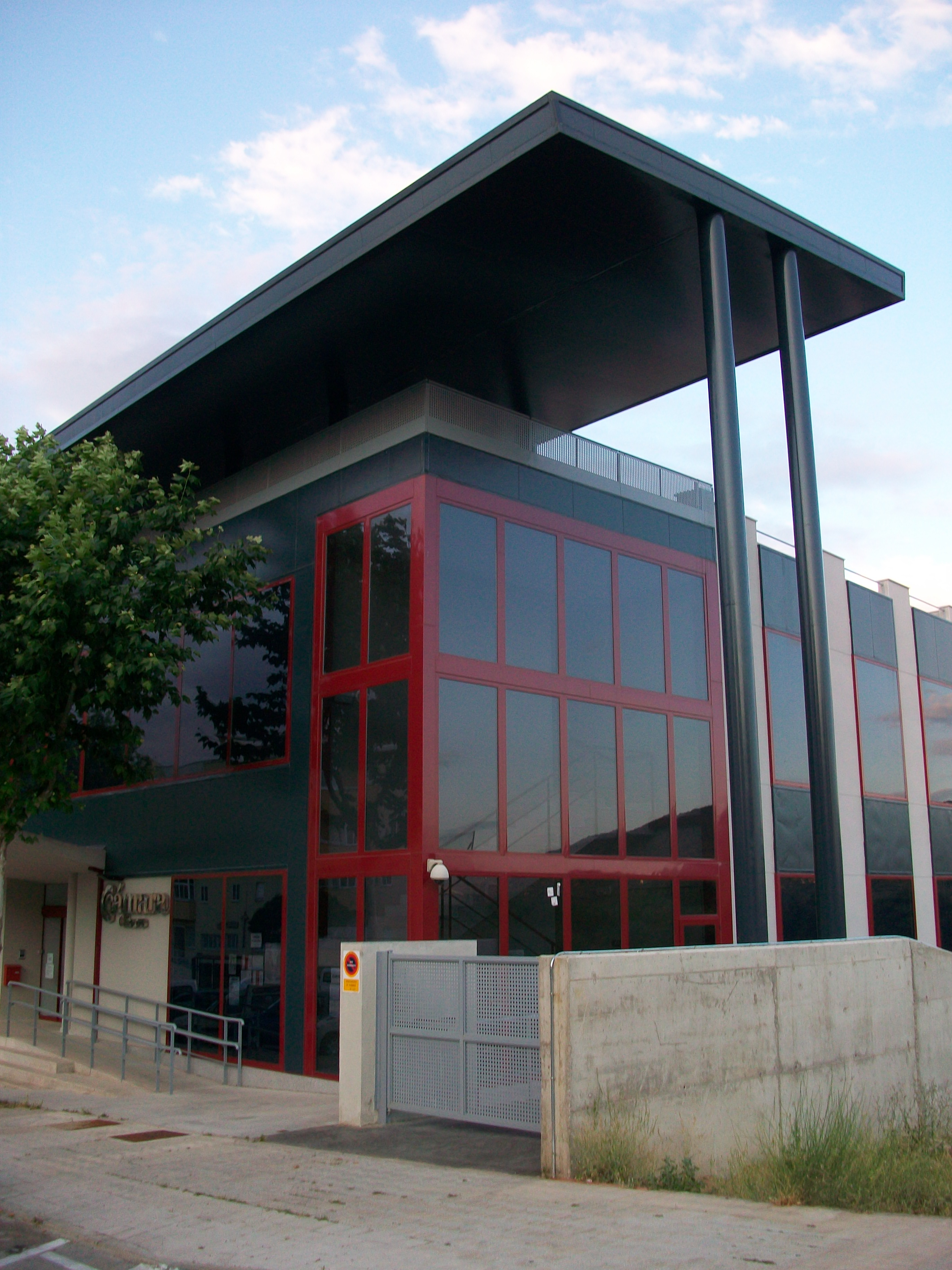 Edificio del vivero de empresas de la Cámara de Comercio de Cáceres en Plasencia.